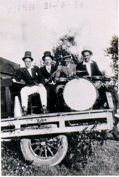 IDENTIFIKATIONSNUMMER 2M16-S-0083-41-71 MOTIV Dansband. "Singing Players". Vara dansbana 21 aug. 1930. Från vänster: Gösta Alexandersson, Johannes Andersson, Gösta Olsson, Björn Brodén.